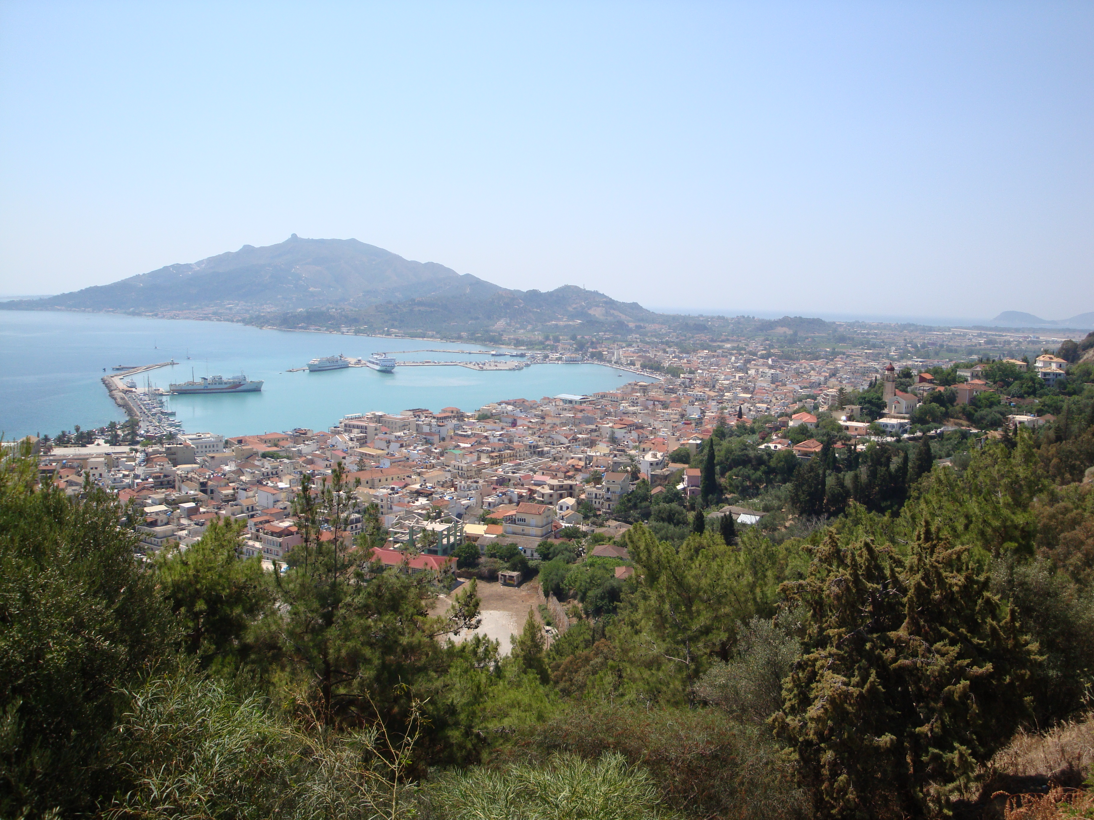 Mesto Zakintos s trdnjave, otok Zakintos.